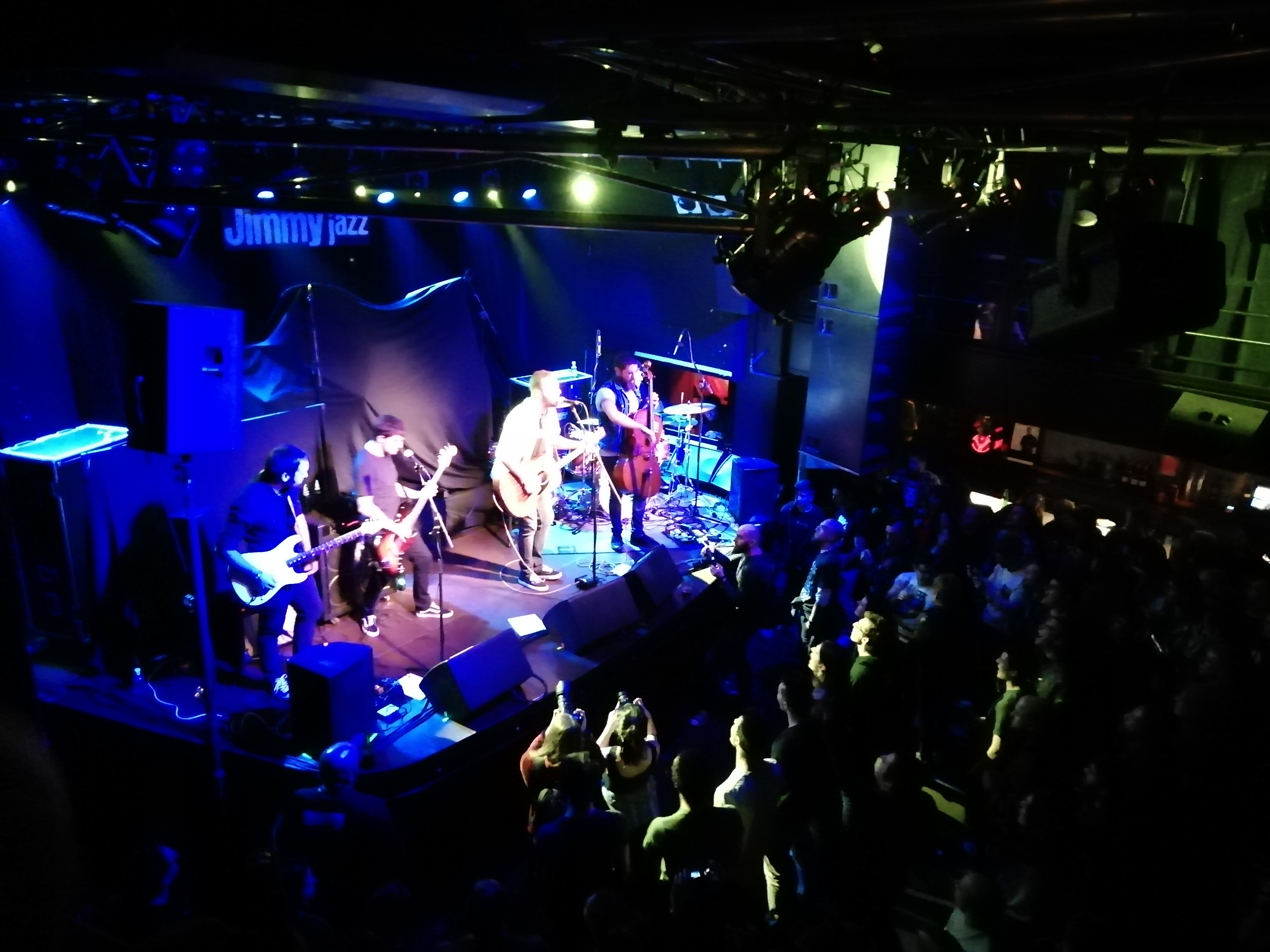 Wood Strings musika taldea 2018-12-22